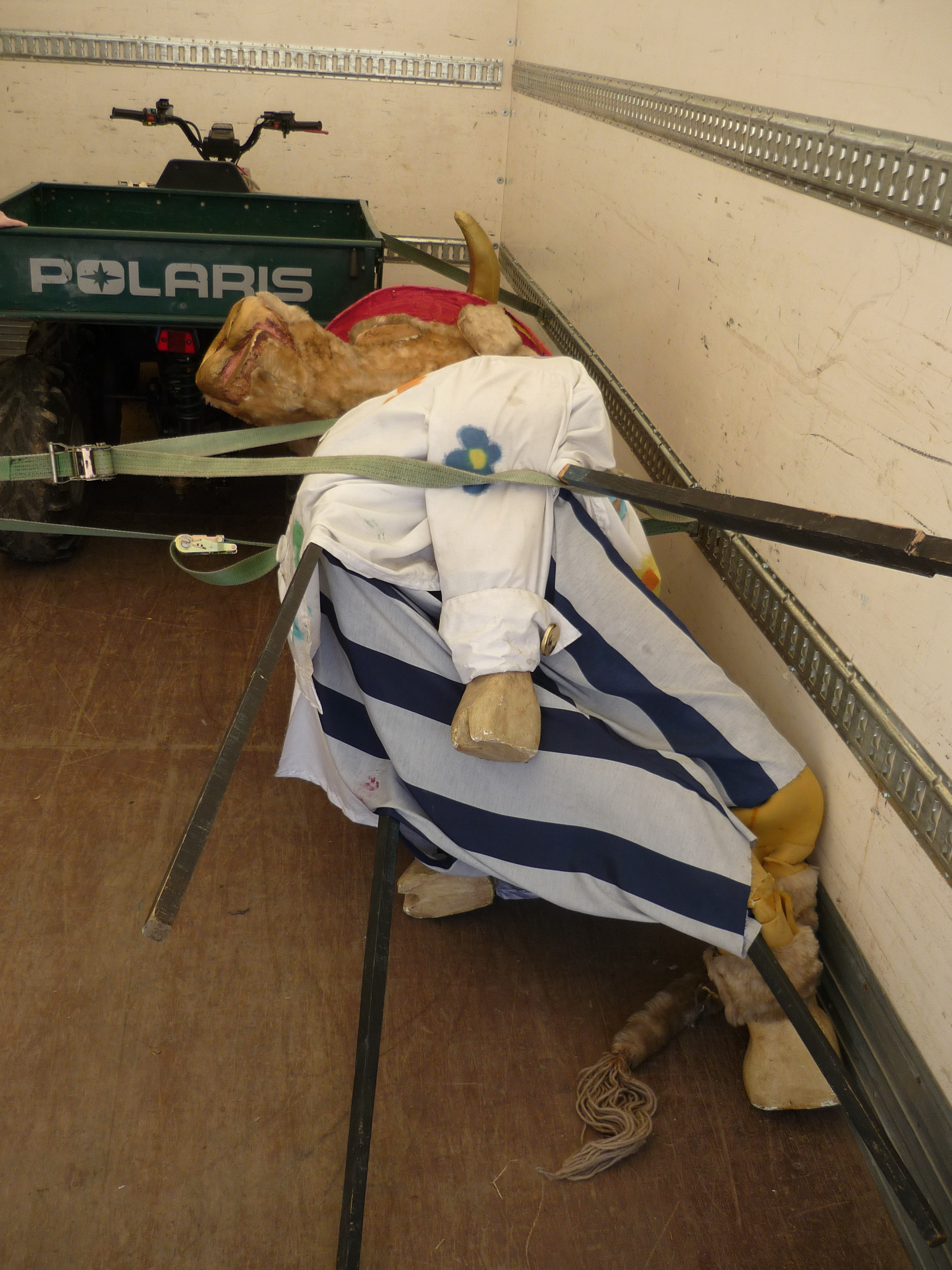 Le Géant-Bœuf du Carnaval de Paris dans le camion des Transports Automobiles Municipaux (TAM) de Paris prêt à rejoindre Paris pour participer à sa dernière sortie au Carnaval de Paris (il sera détruit dans un incendie en juin 2009 à Bugeat en Corrèze).